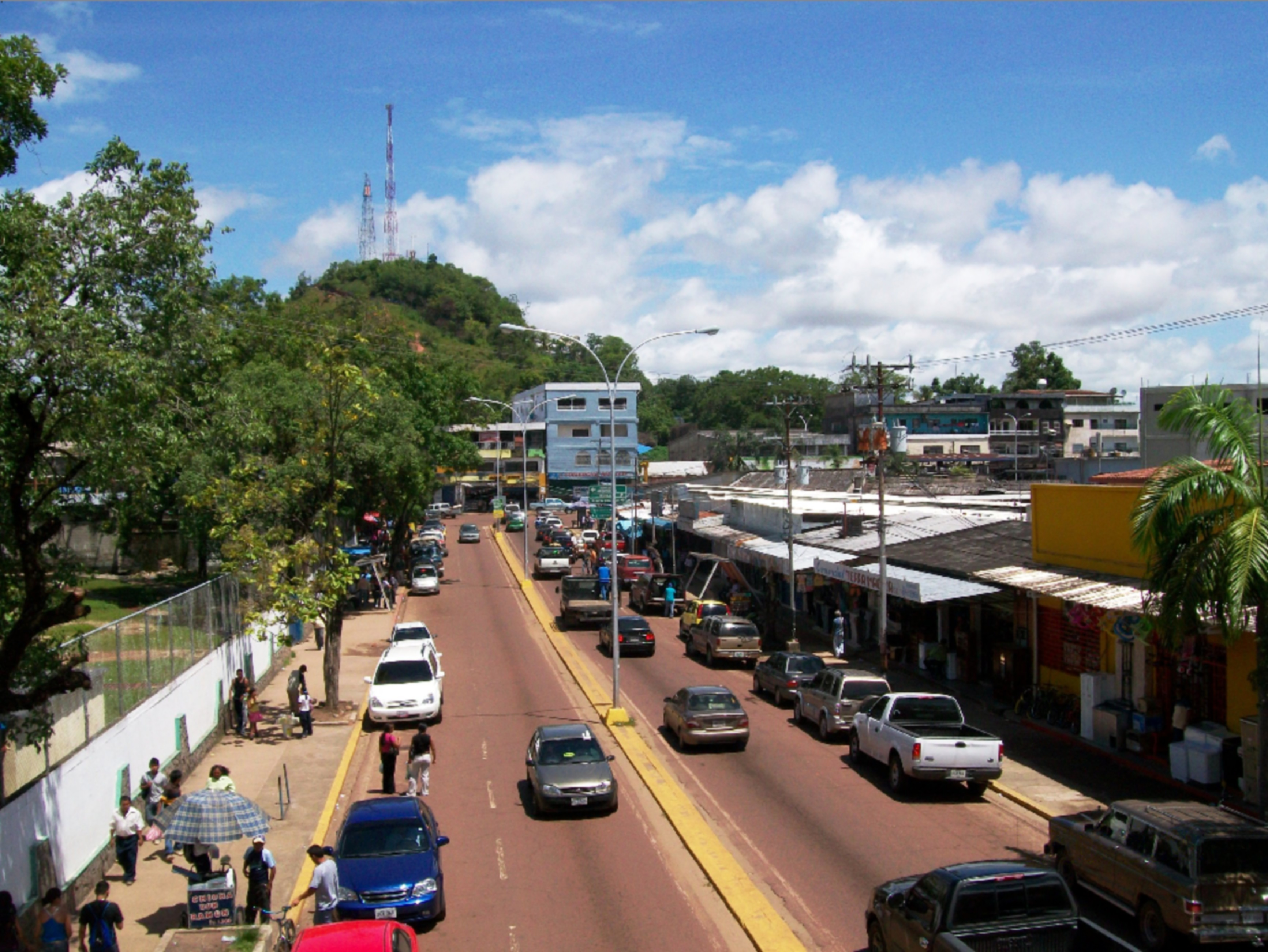 la avenida 23 de enero de puerto ayacucho la sengunda mas importante de la ciudad,vita legana de la avenida orinoco y all fondo el cerro perico